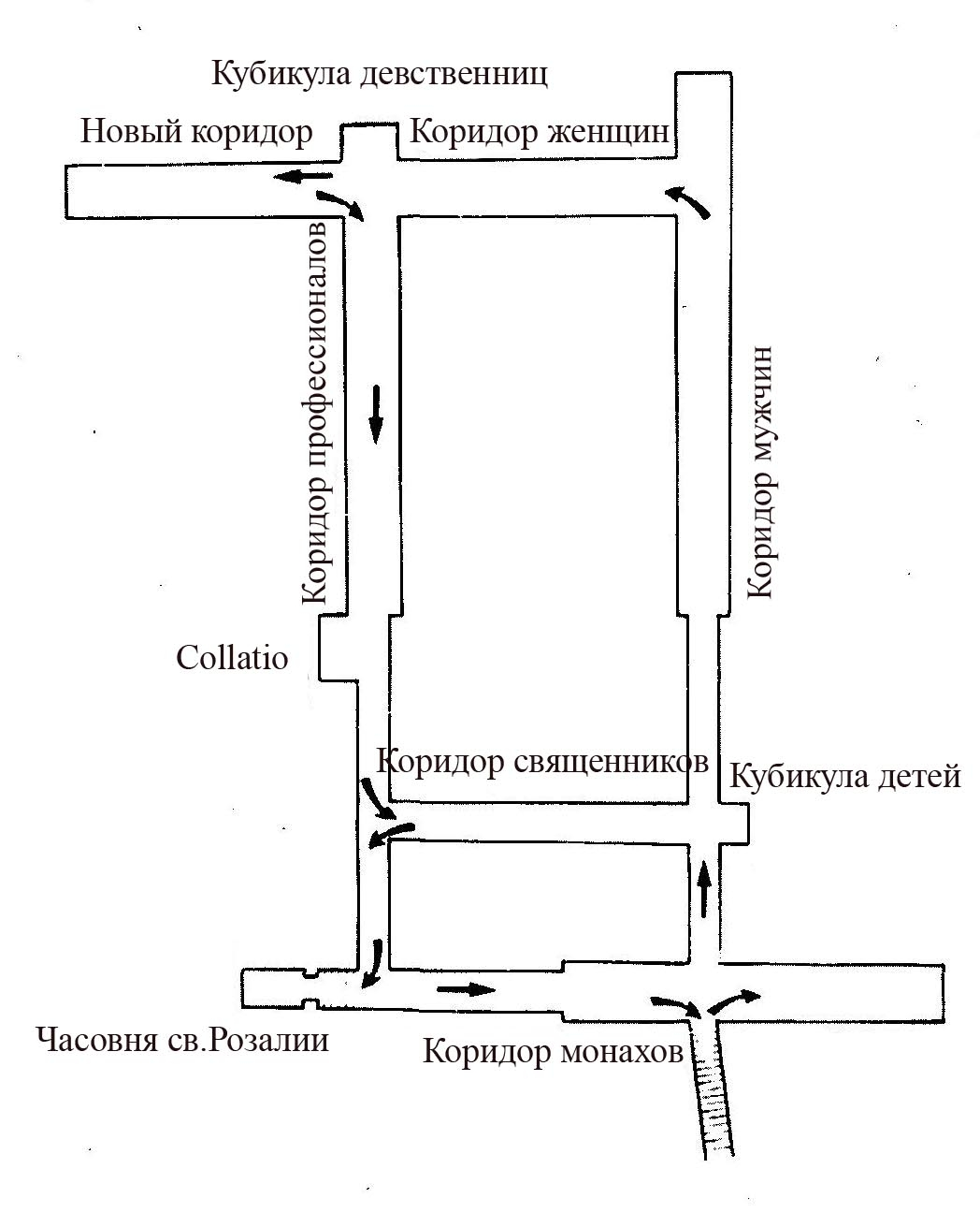 Capuchins' catacombs plan (Russian language) План Катакомб капуцинов (русский язык). Настоящий план - дело рук компьютерного гения (и моего сисадмина) Тихомирова Александра Владимировича